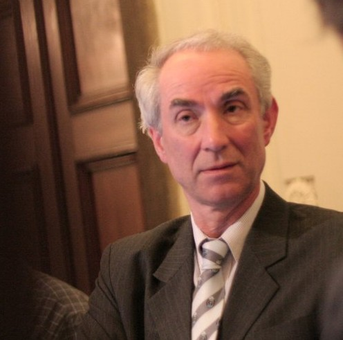 Uitsnede van bestaand bestand op Wikipedia, te weten nl::Afbeelding:GerdLeers.jpg, gemaakt door Sander Bakkes.